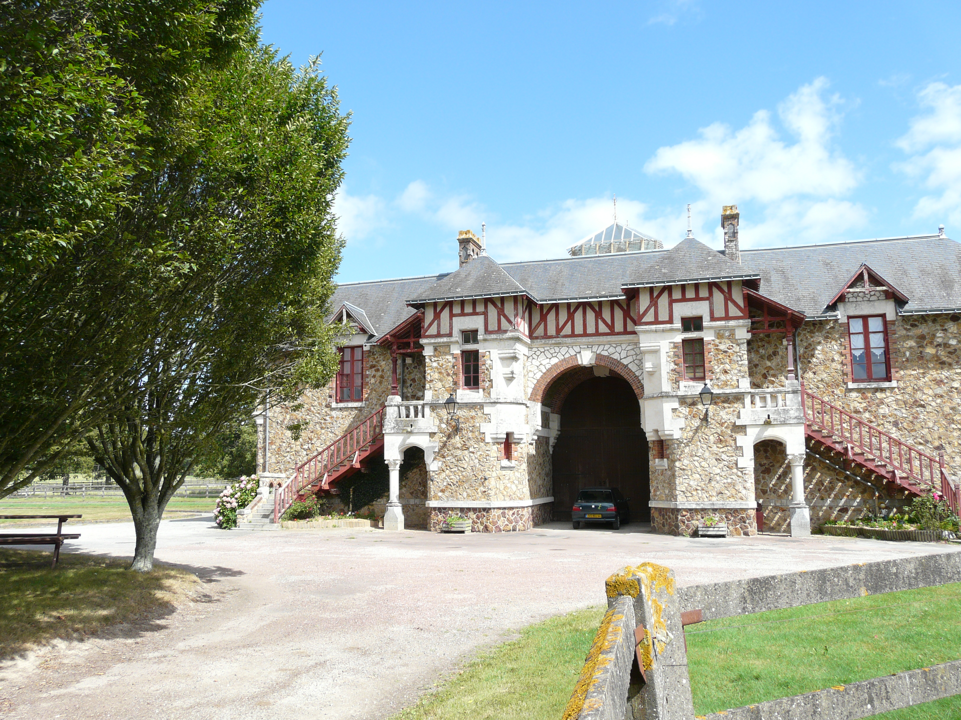 Le Haras de Gâtine côté sud